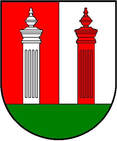 Vėžaičių herbas